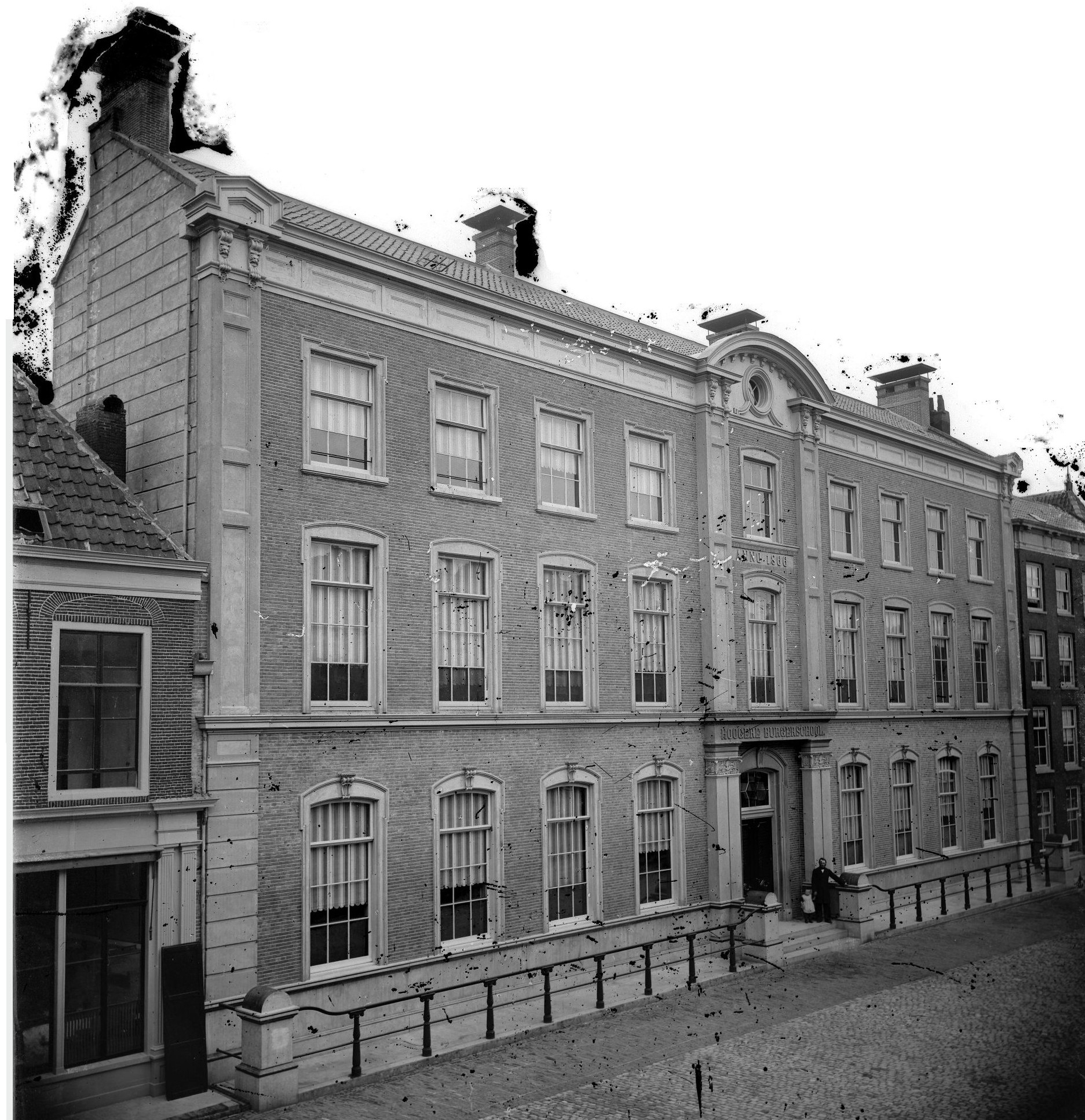 HBS school for boys in Leiden. Pieterskerkgracht. Built in 1866. Demolished in 1969.